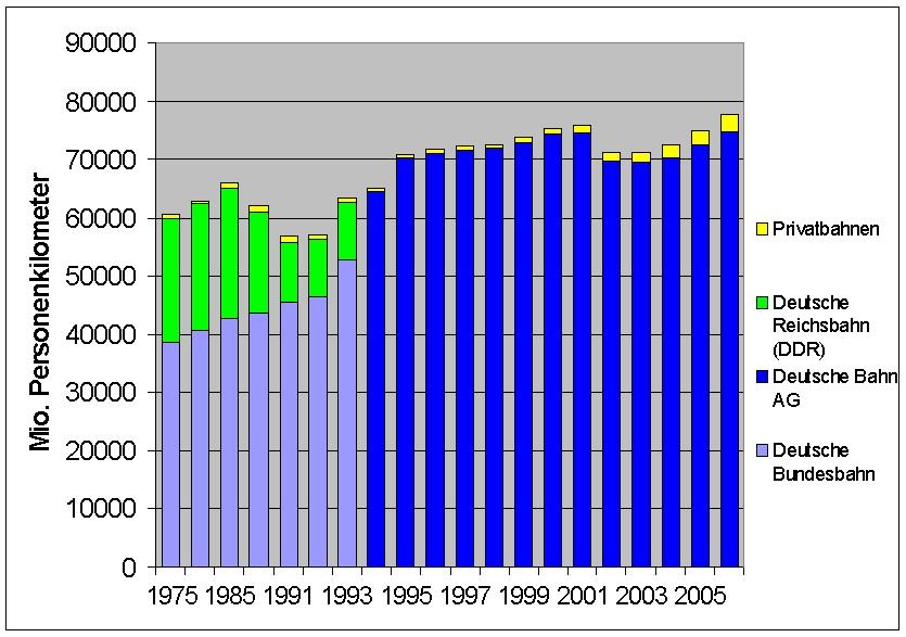 PersonenVerkehrsleistung der Eisenbahnen in Deutschland bis 2006